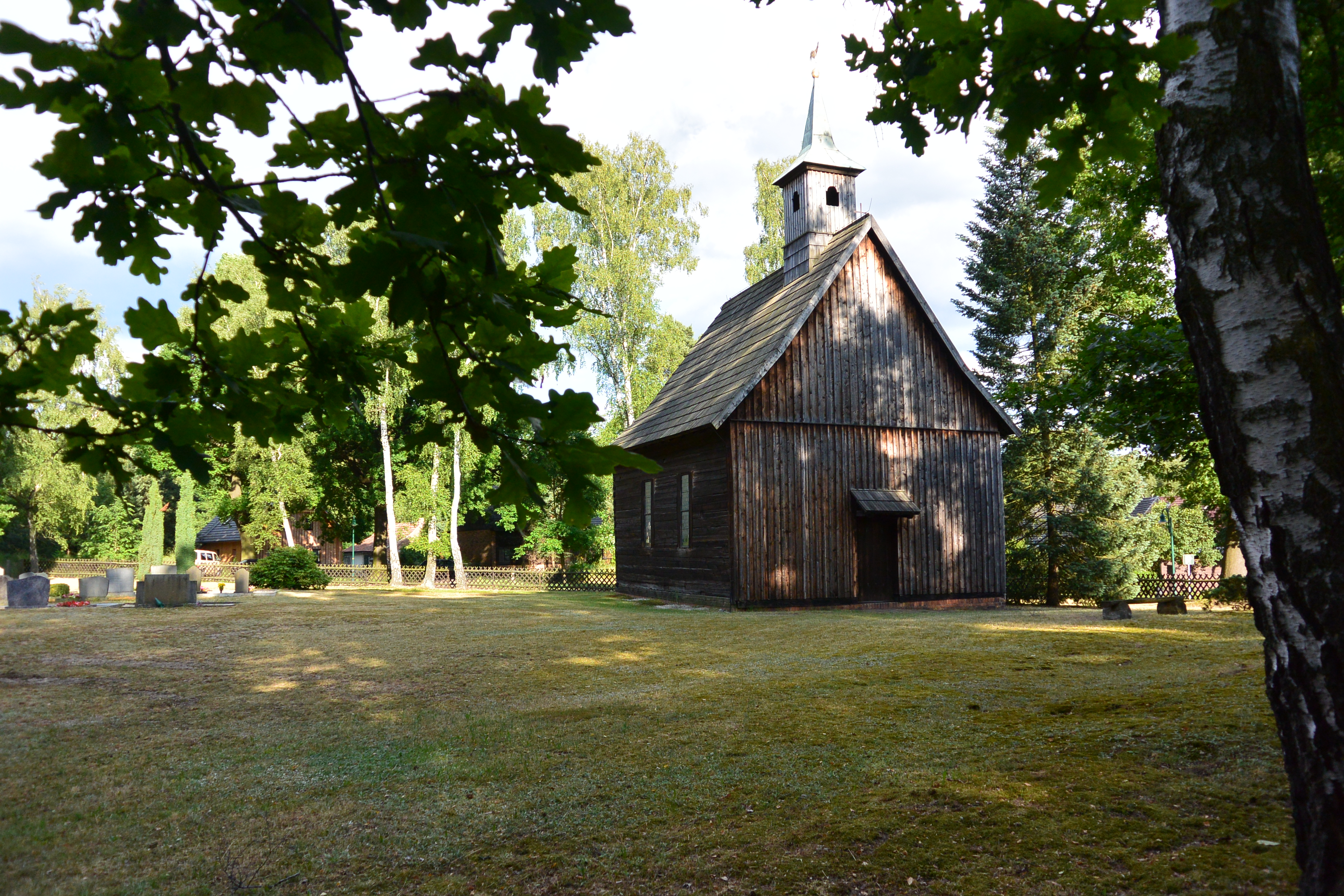 Friedhof und Schrotholzkirche (denkmalgeschützte Kapelle) in Sprey